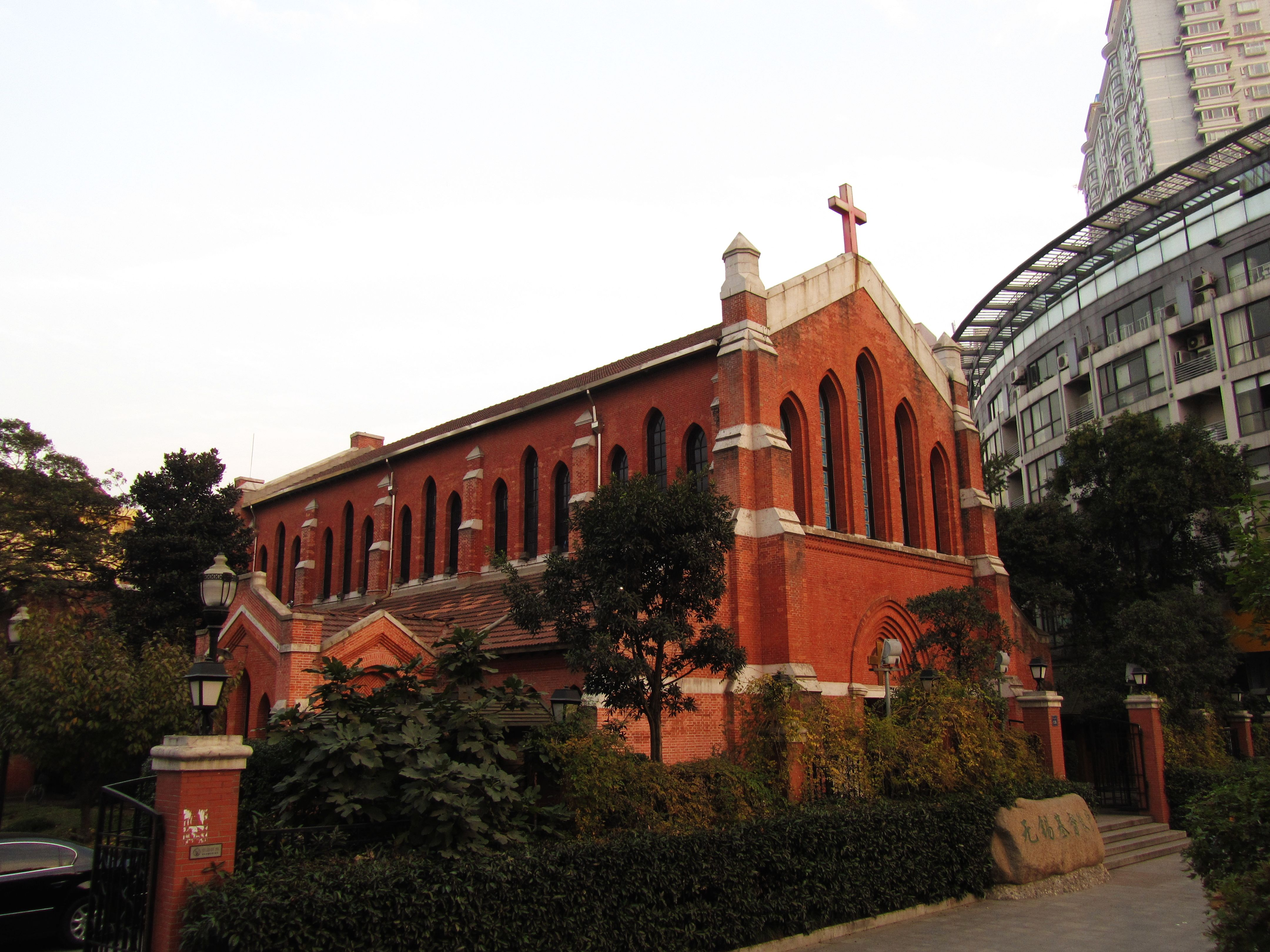 无锡基督教堂，西北侧。